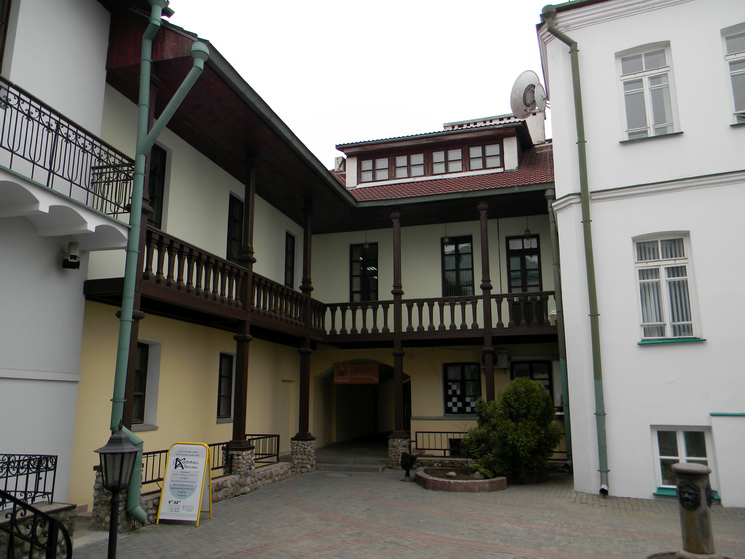 Мінск. Музычны завулак